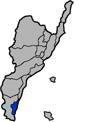 本圖係小籃子為編輯台東縣大武鄉所改繪，感謝KJ提供原圖。